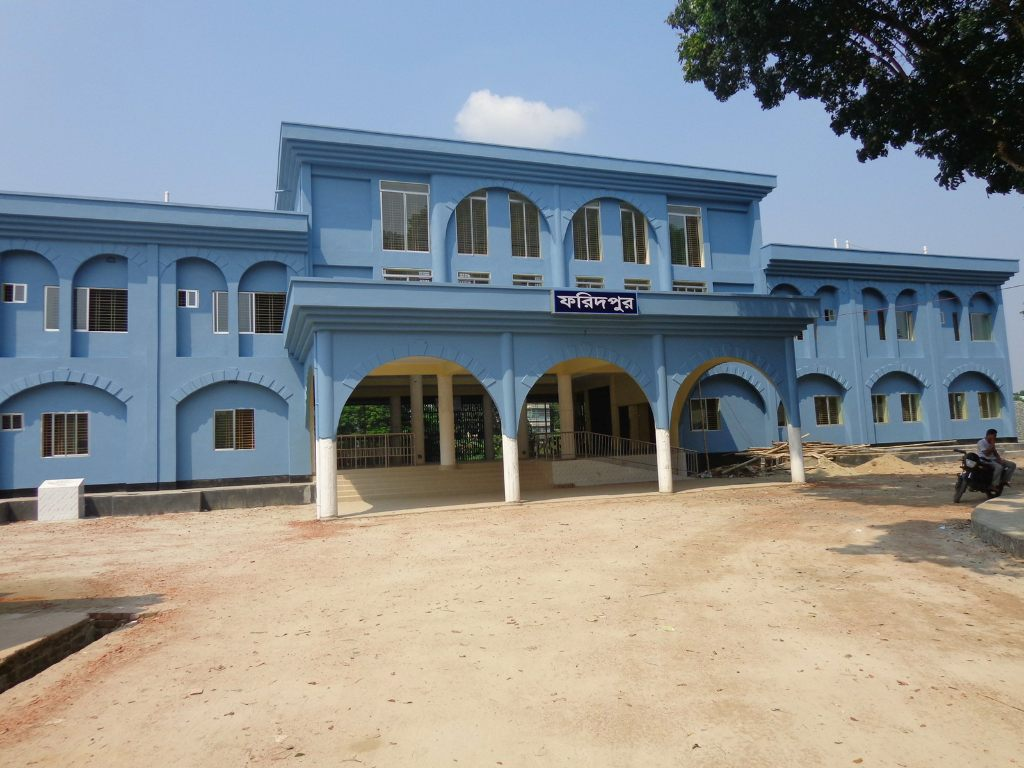 ফরিদপুর রেলওয়ে ষ্টেশন। স্থান স্টেশন রোড ফরিদপুর।